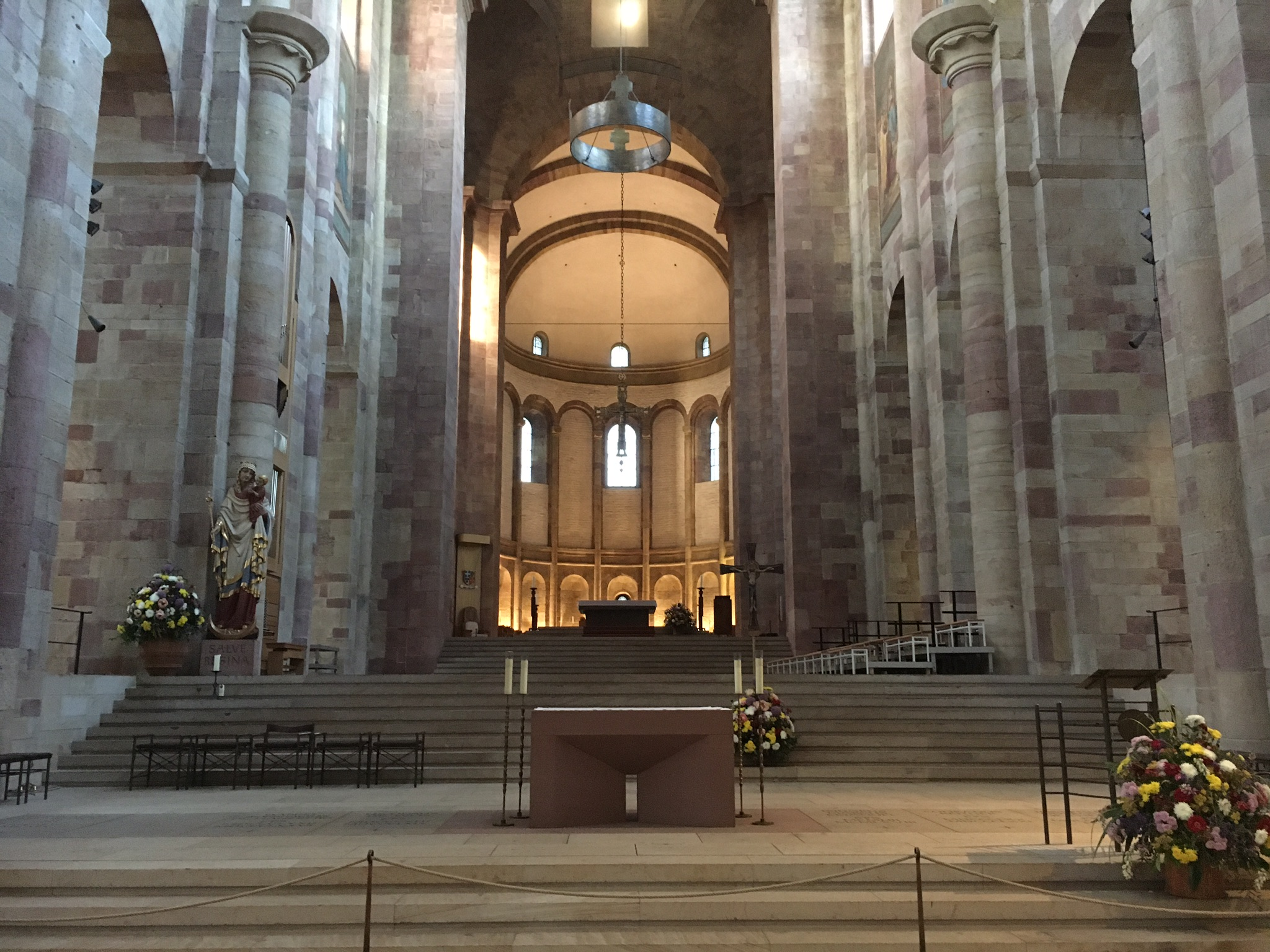 Blick auf den Altar des Kaiserdom zu Speyer